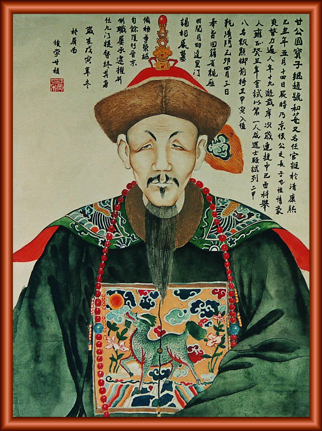 甘國寶，清朝武將，福建陸路提督。